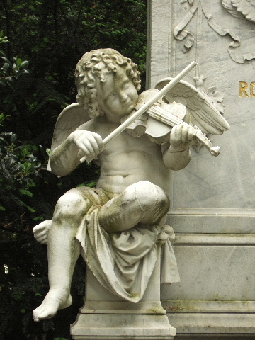 Geigende Putte – Ausschnitt aus dem Schumann-Grab auf dem Alten Friedhof in Bonn